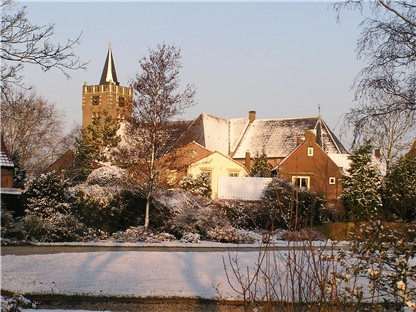 Het kerkgebouw van de Hervormde Gemeente te Nieuwe Tonge.